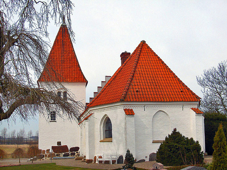 fra sydøst